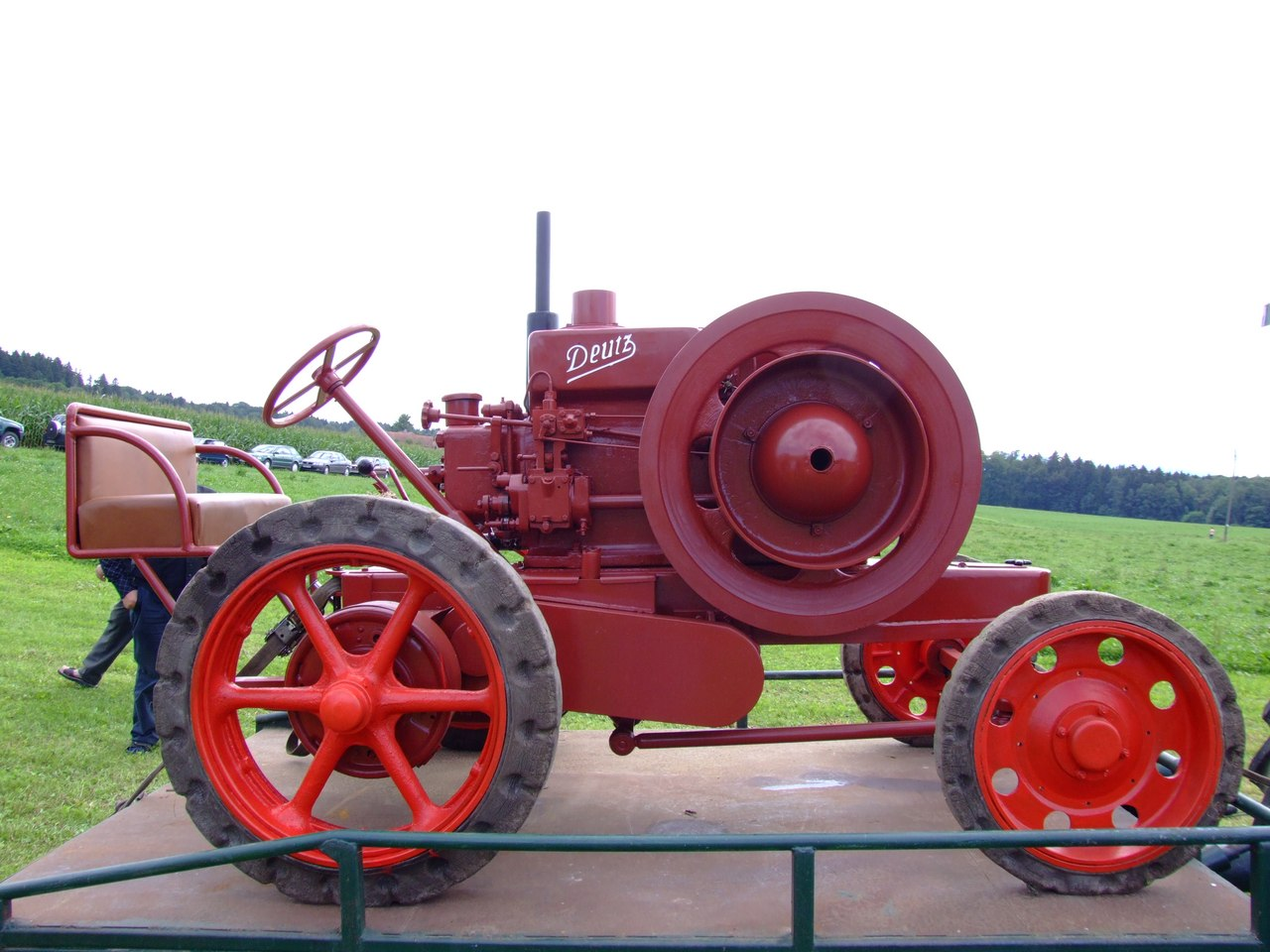 Schlepper mit Deutz-Motor, vermutlich Deutz MTH 222